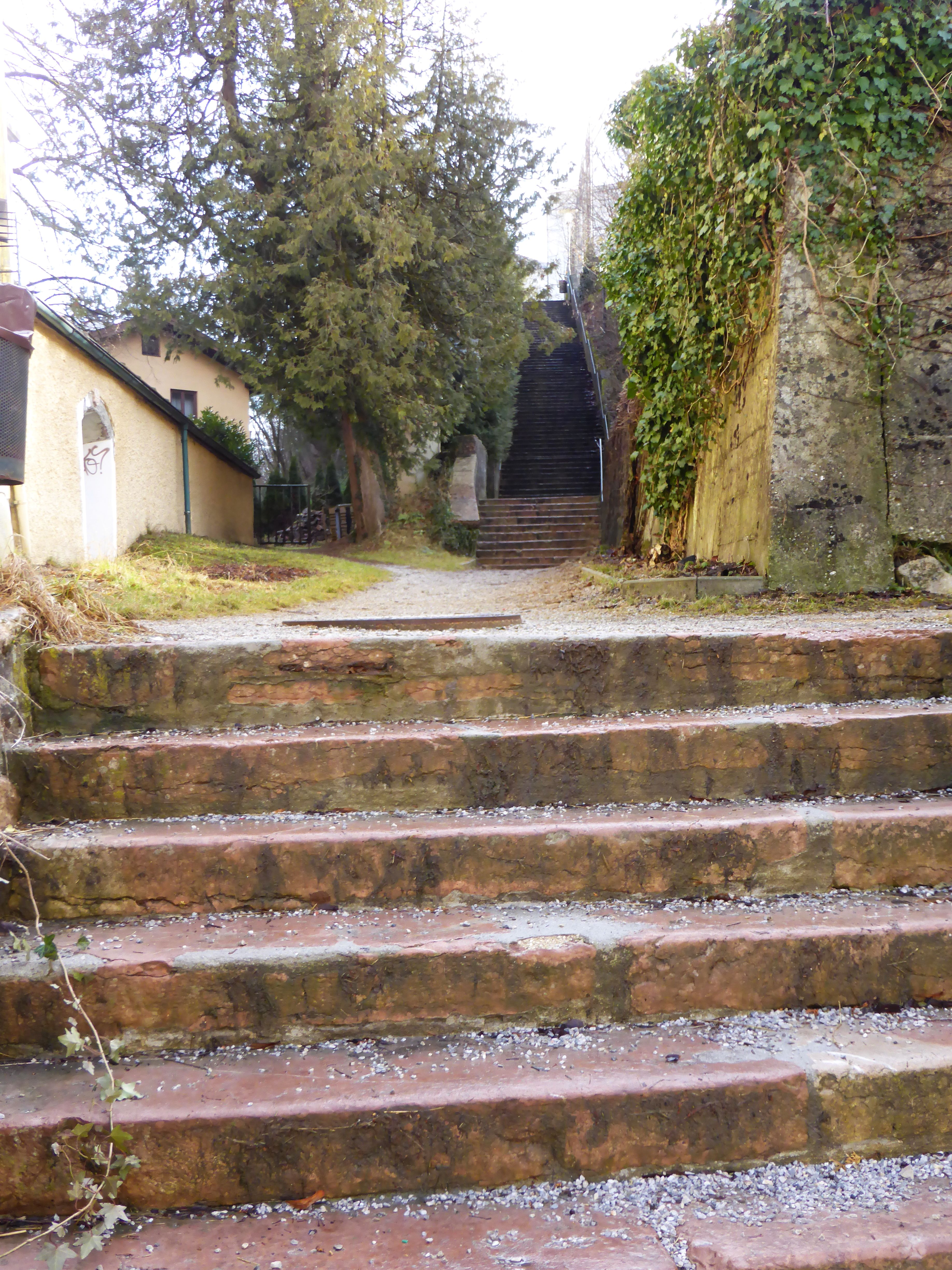 Rest der ehem. Stiegenanlage zum Augustinerkloster und Bildstock. In Hallein.